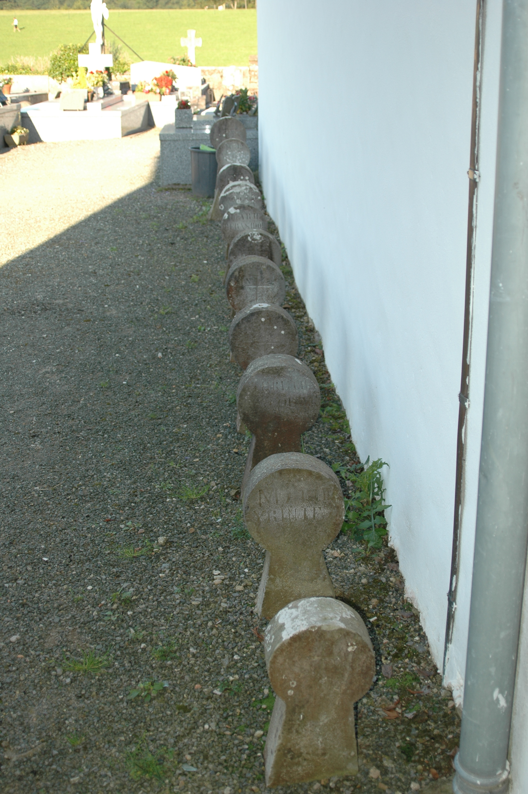 Biriatou, stèles discoïdales